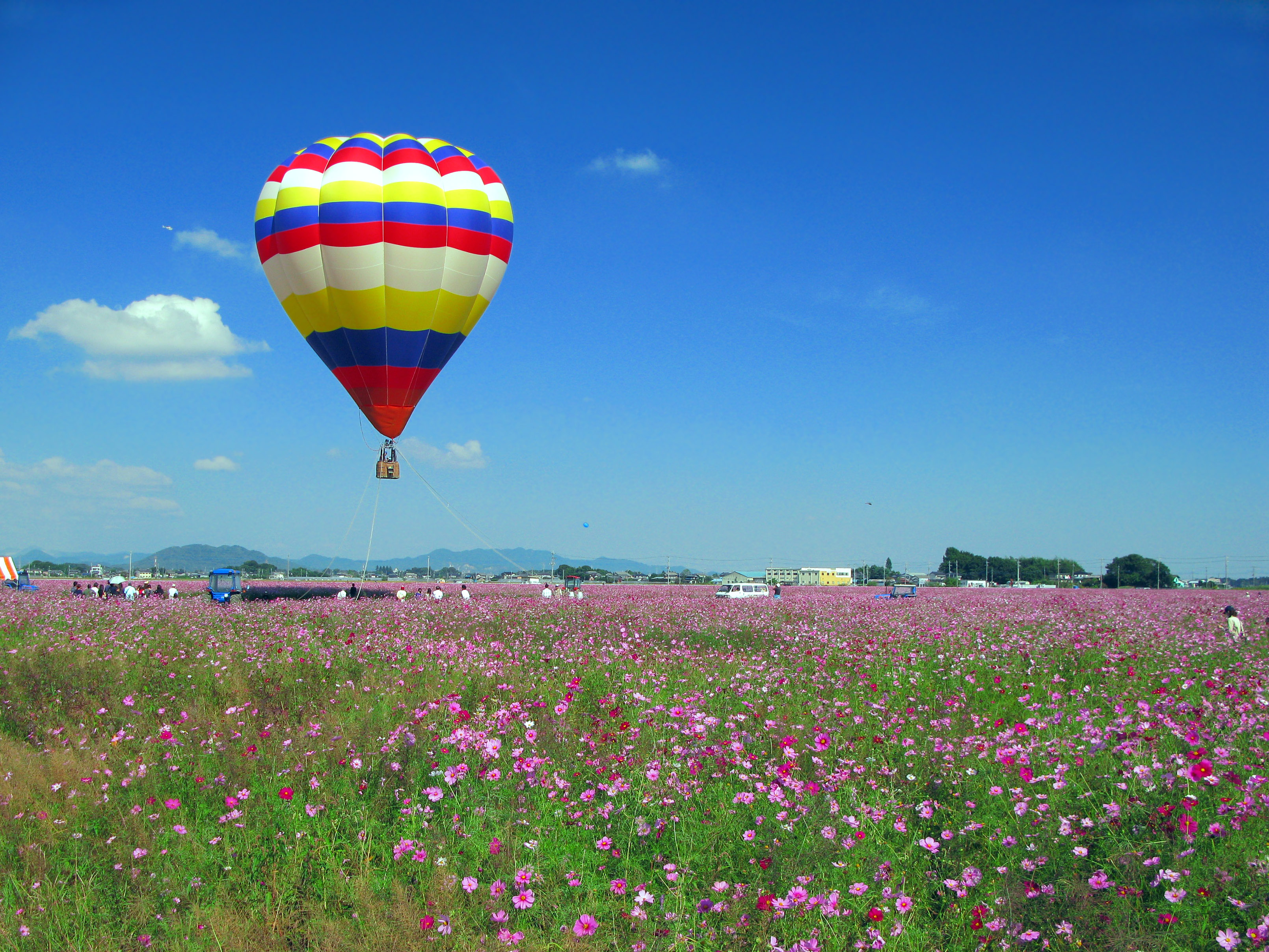 板倉コスモスまつり（群馬県邑楽郡板倉町）